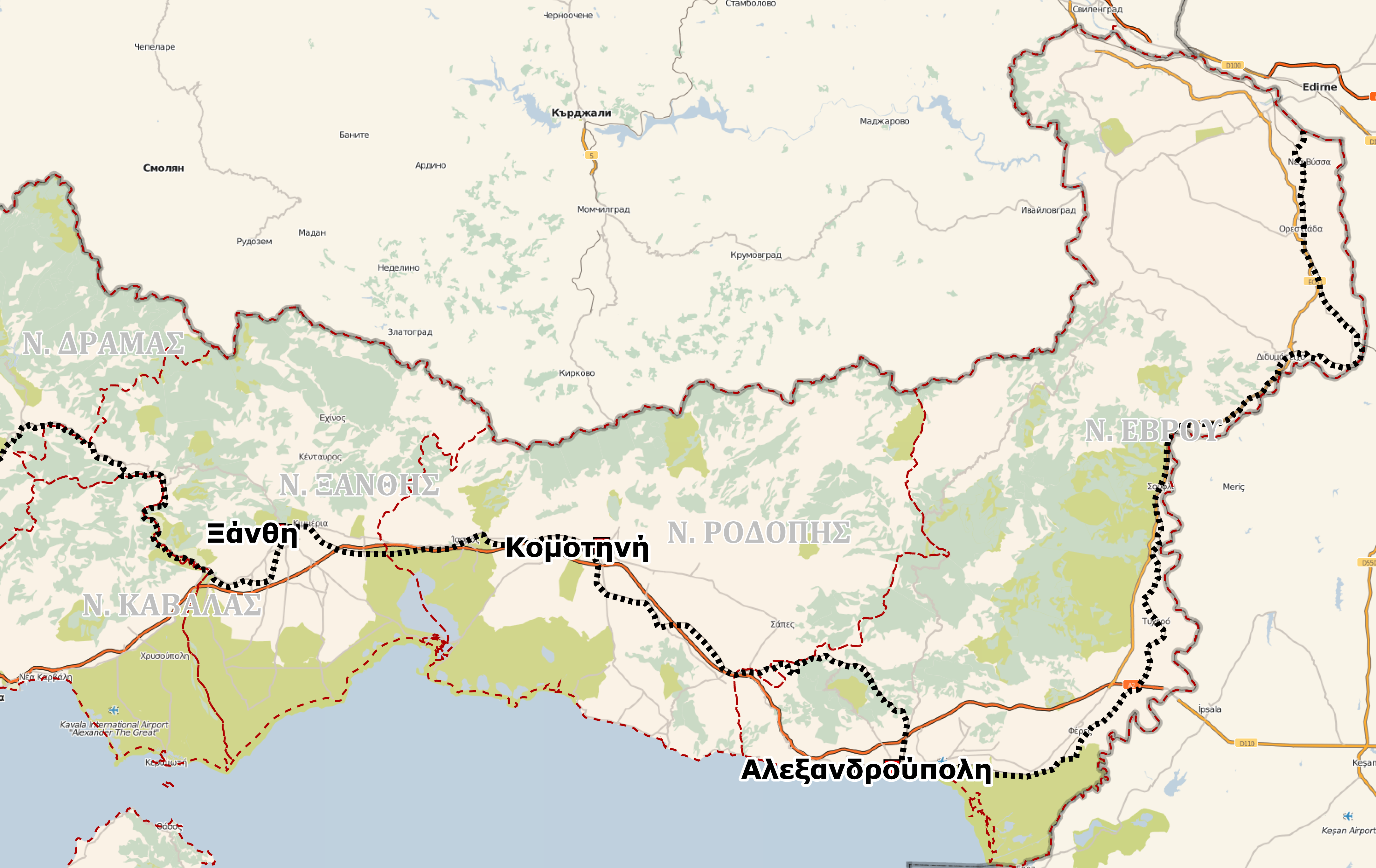 Χάρτης της Δυτικής Θράκης. Δημιουργήθηκε με το TileMill με στοιχεία από ελεύθερες βάσεις δεδομένων : [1] και [2]